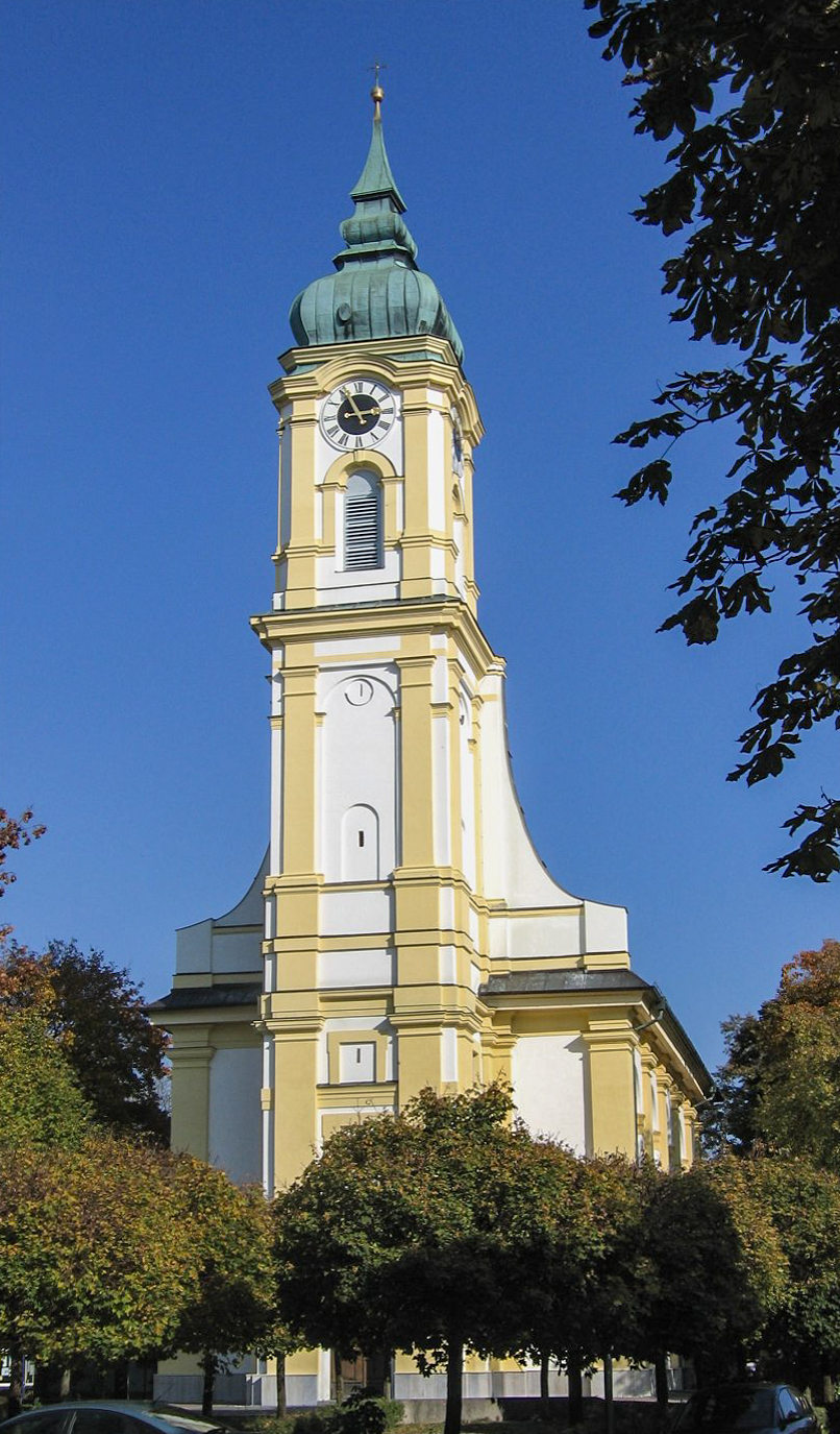 Kirche St. Michael in München-Perlach